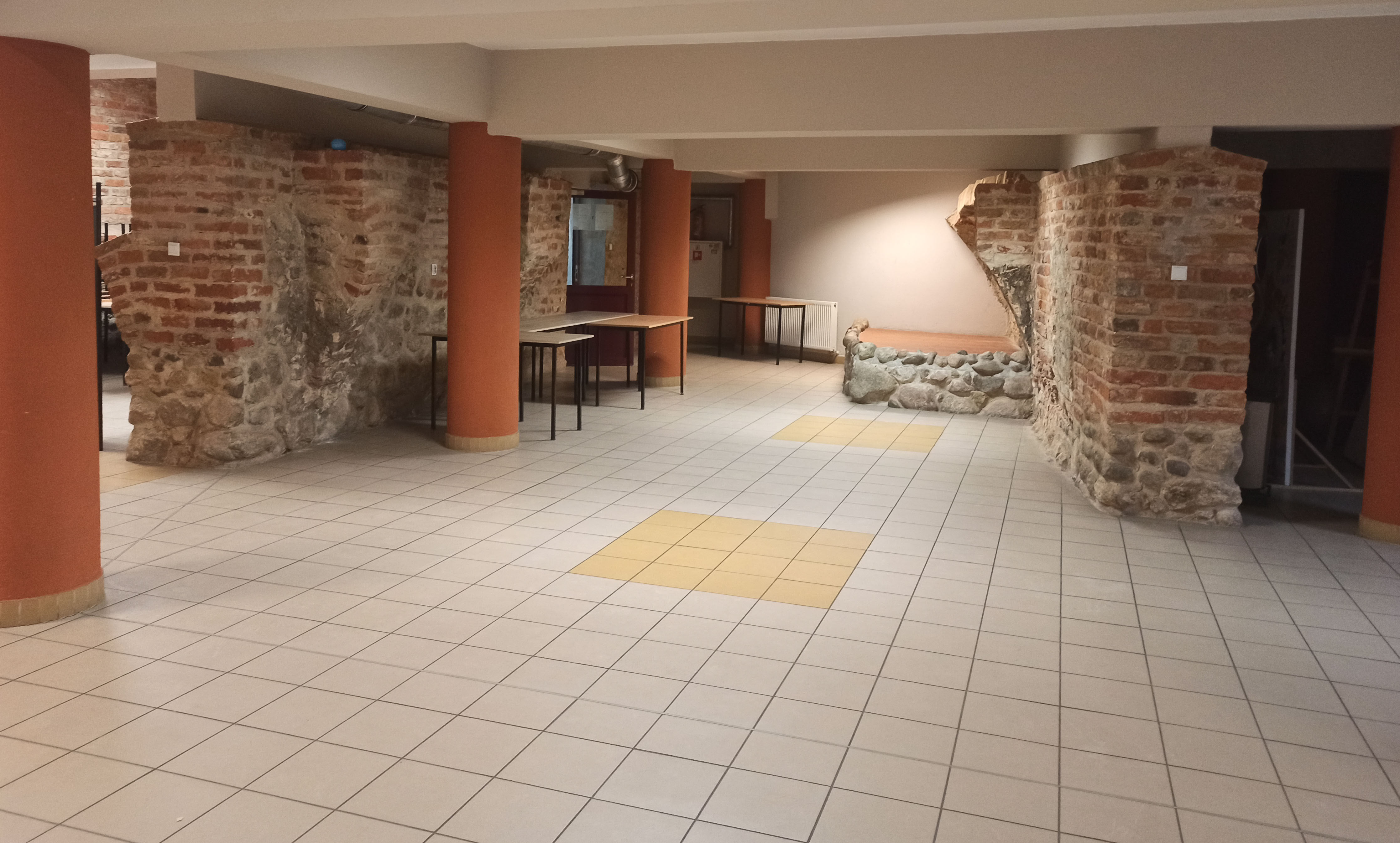 Braniewo Braniewskie Centrum Kultury Dwór Artusa w Braniewie piwnice